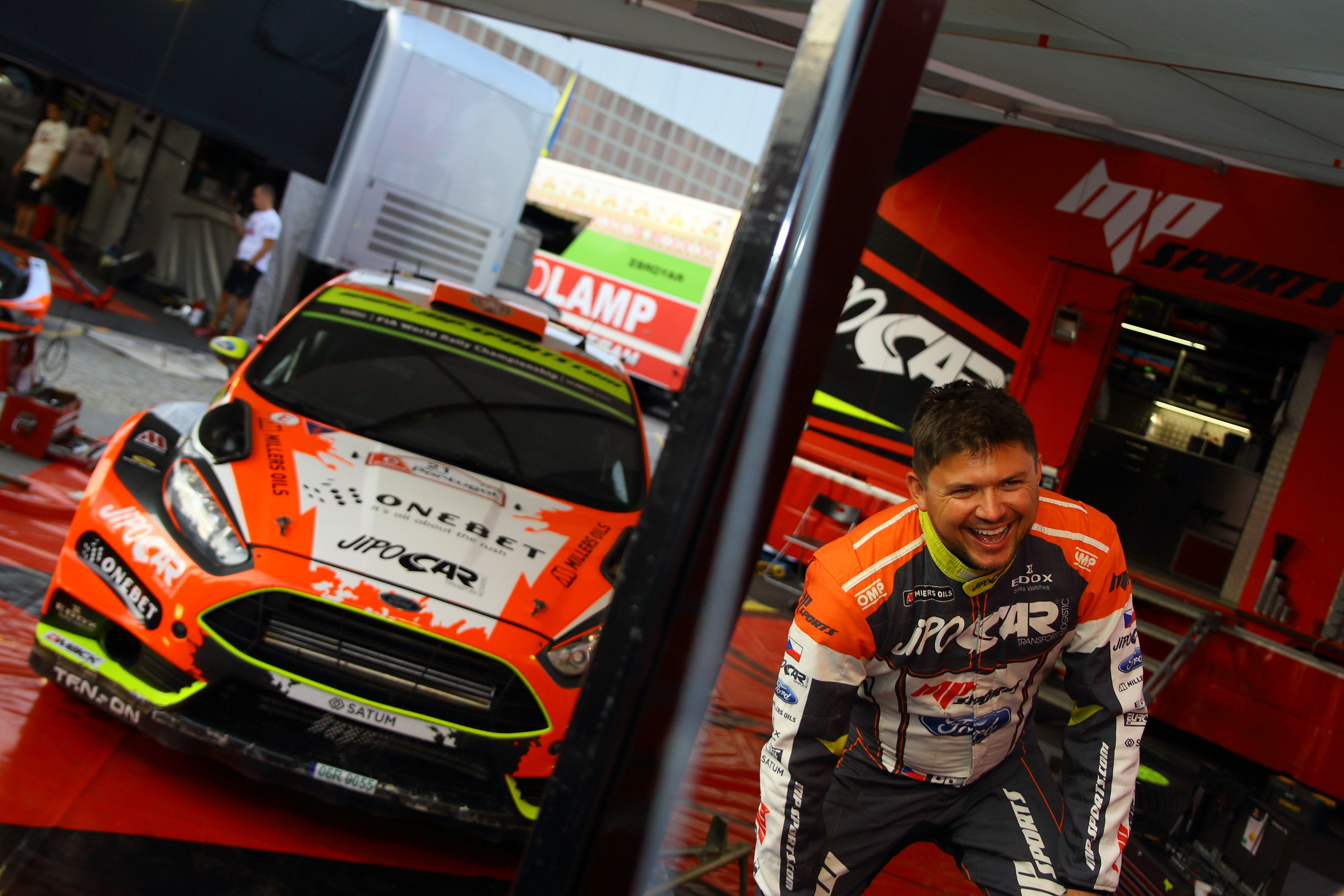 2017 Rally de Portugal